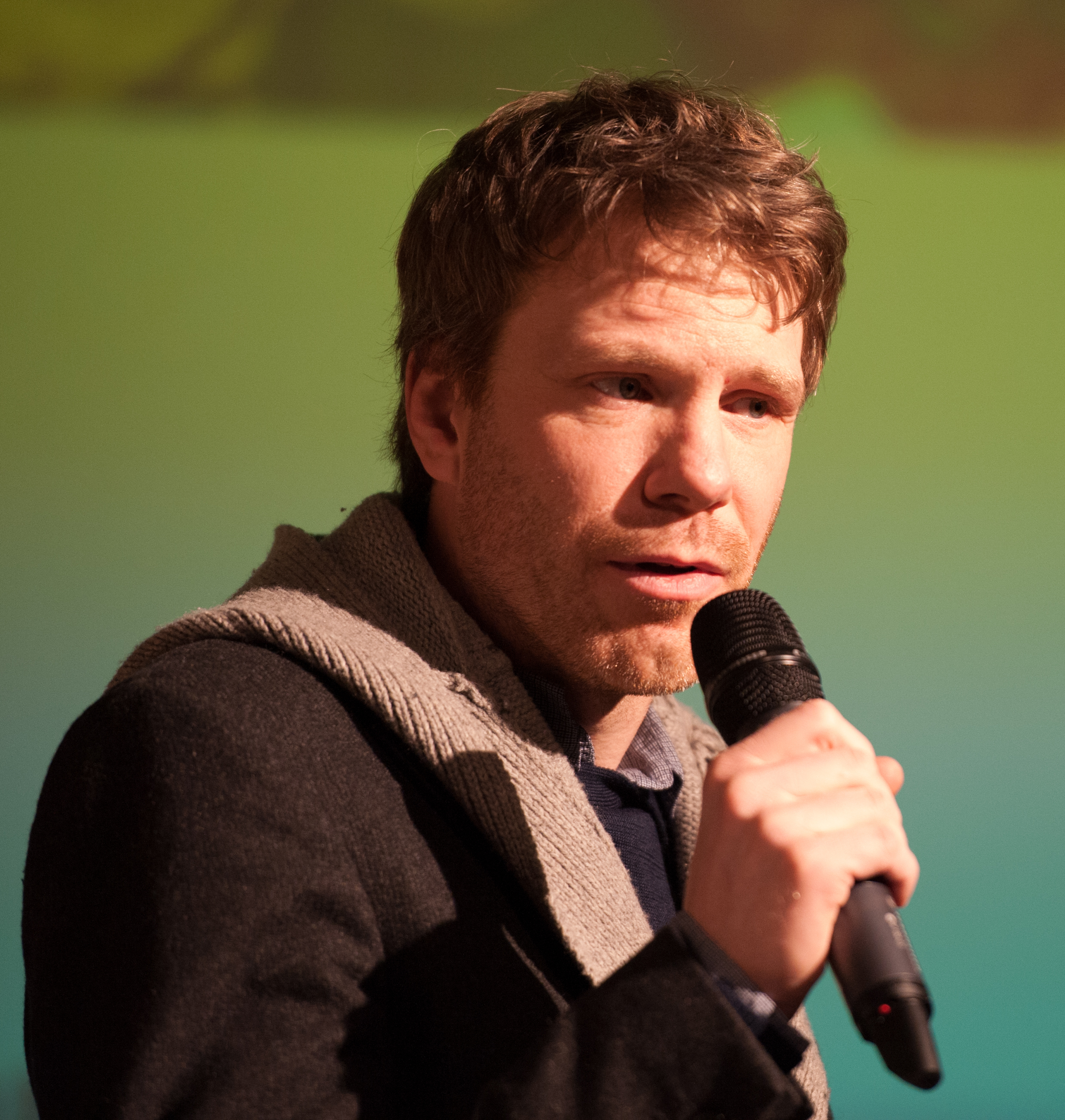 Photo: Martin Risseeuw